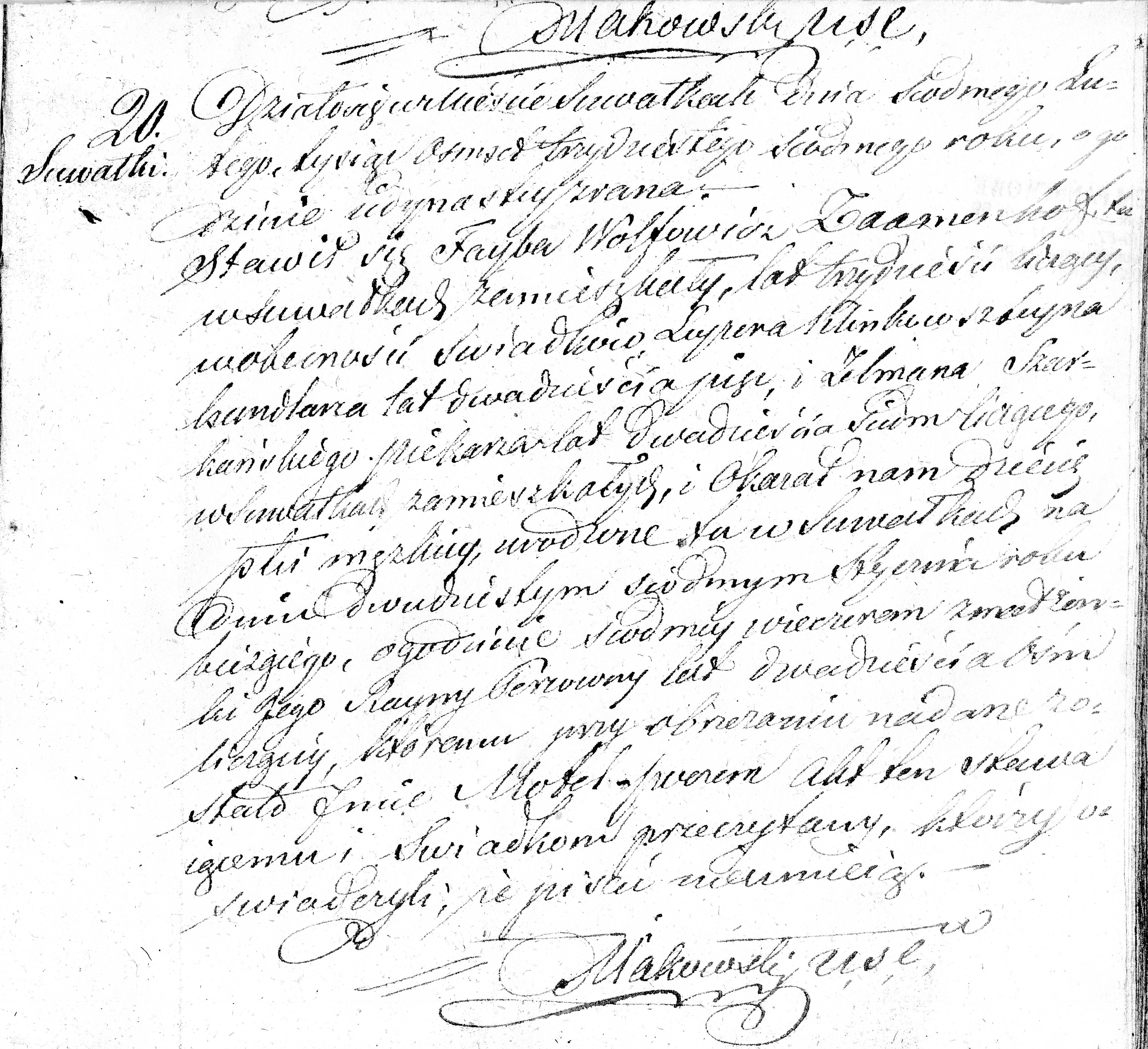 Akta Urzędnika Stanu Cwilnego Wyznania Moyżeszowego Okręgu Suwalskiego i Jeleniewskiego z Roku 1837, poz. 20. Działo się w Mieście Suwałkach, dnia siódmego lutego tysiąc osiemset trzydziestego siódmego roku, o godzinie iedynastey z rana. Stawił się Fayba Wolfowicz Zaamenhof, tu w Suwałkach zamieszkały, lat trzydzieści liczący, w obecności świadków Leyzera Klinkowszteyna handlarza lat dwadzieścia pięć, i Zelmana Szarkańskiego, piekarza, lat dwadzieścia siedm liczącego w Suwałkach zamieszkałych, i okazał nam dziecię płci męzkiey urodzone tu w Suwałkach na dniu dwudziestym siódmym stycznia roku bieżącego, o godzinie siódmey wieczorem z małżonki jego Rayny Percowny lat dwadzieścia ośm liczącey, któremu przy obrzezaniu nadane zostało imię Motel, poczem akt ten stawaiącemu i świadkom przeczytany, którzy oświadczyli, że pisać nieumieią. Makowski U. S. C.